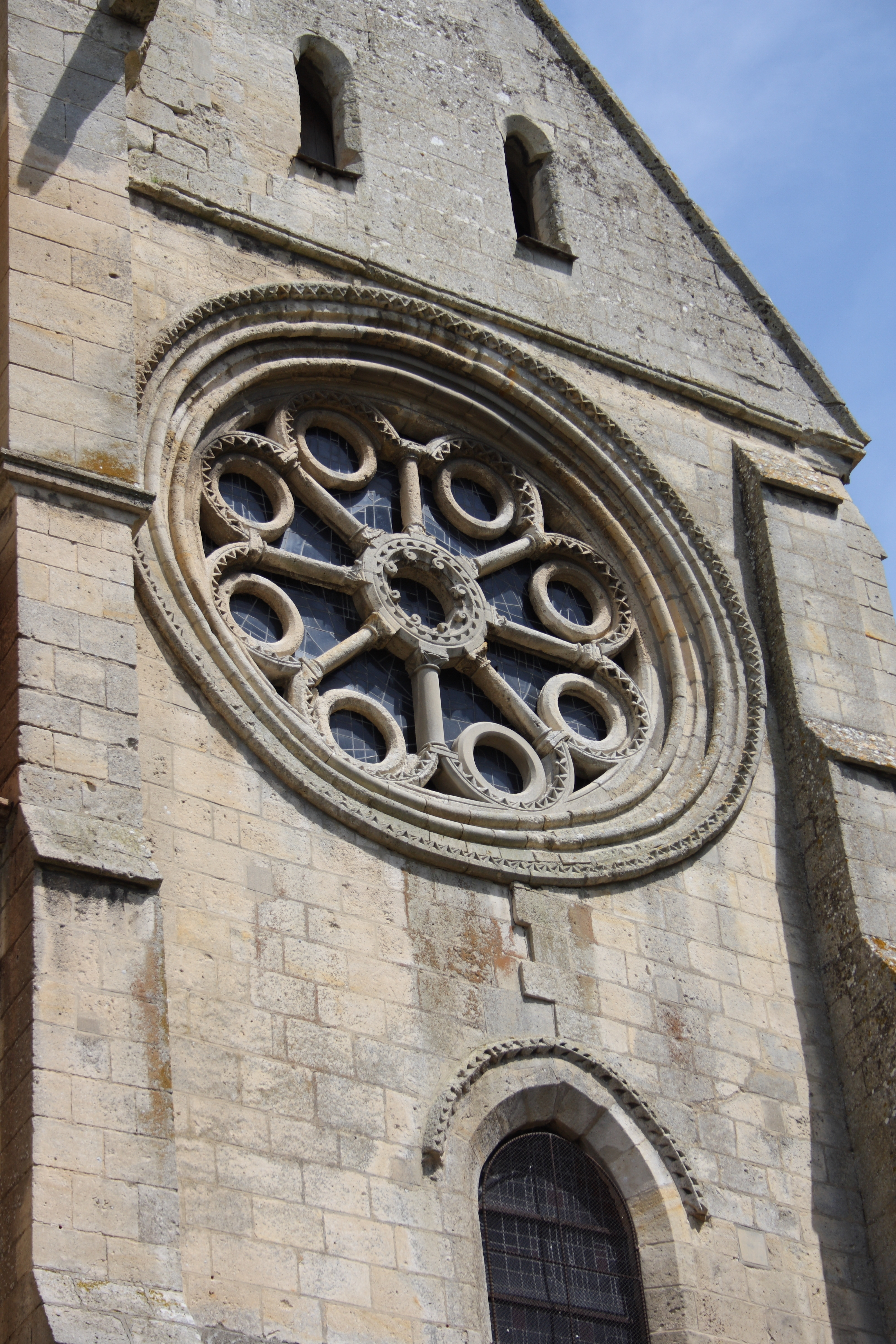 katholische Pfarrkirche Saint-Sulpice in Chars